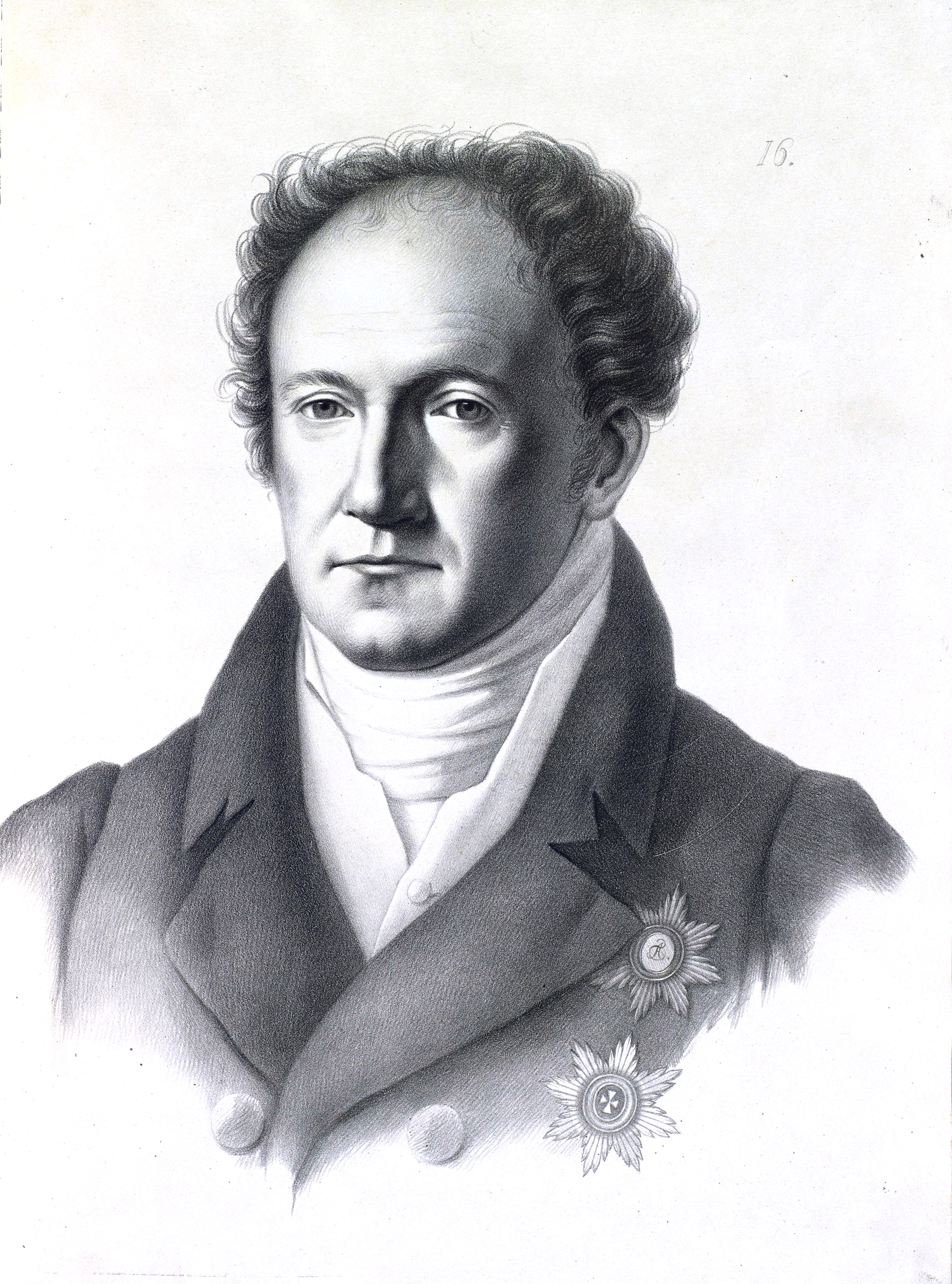 Голицын, Александр Николаевич